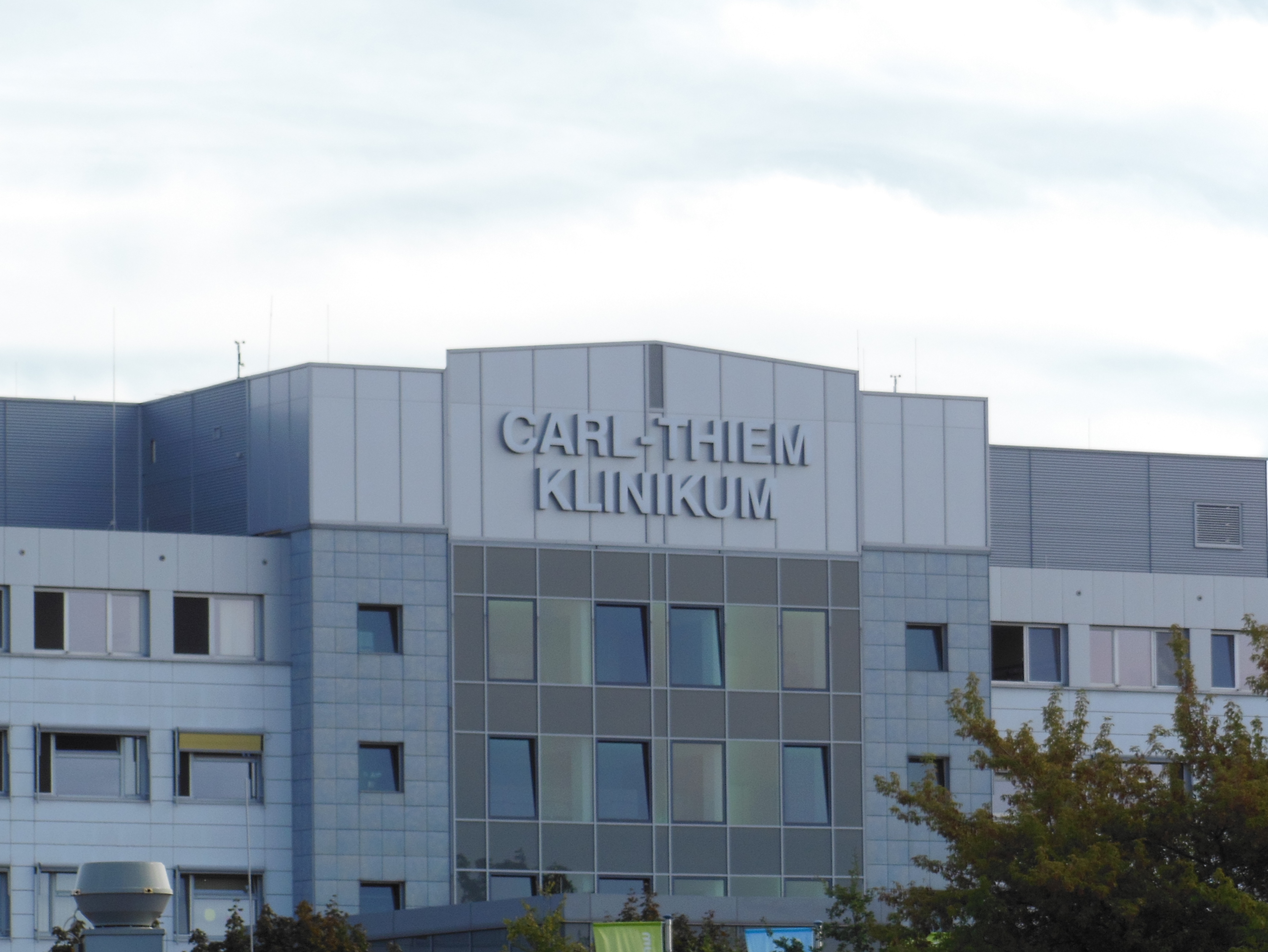 Schriftzug Carl-Thiem-Klinikum Cottbus (Welzower Straße)